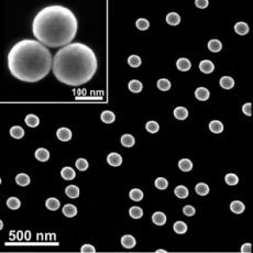 Макрофаги